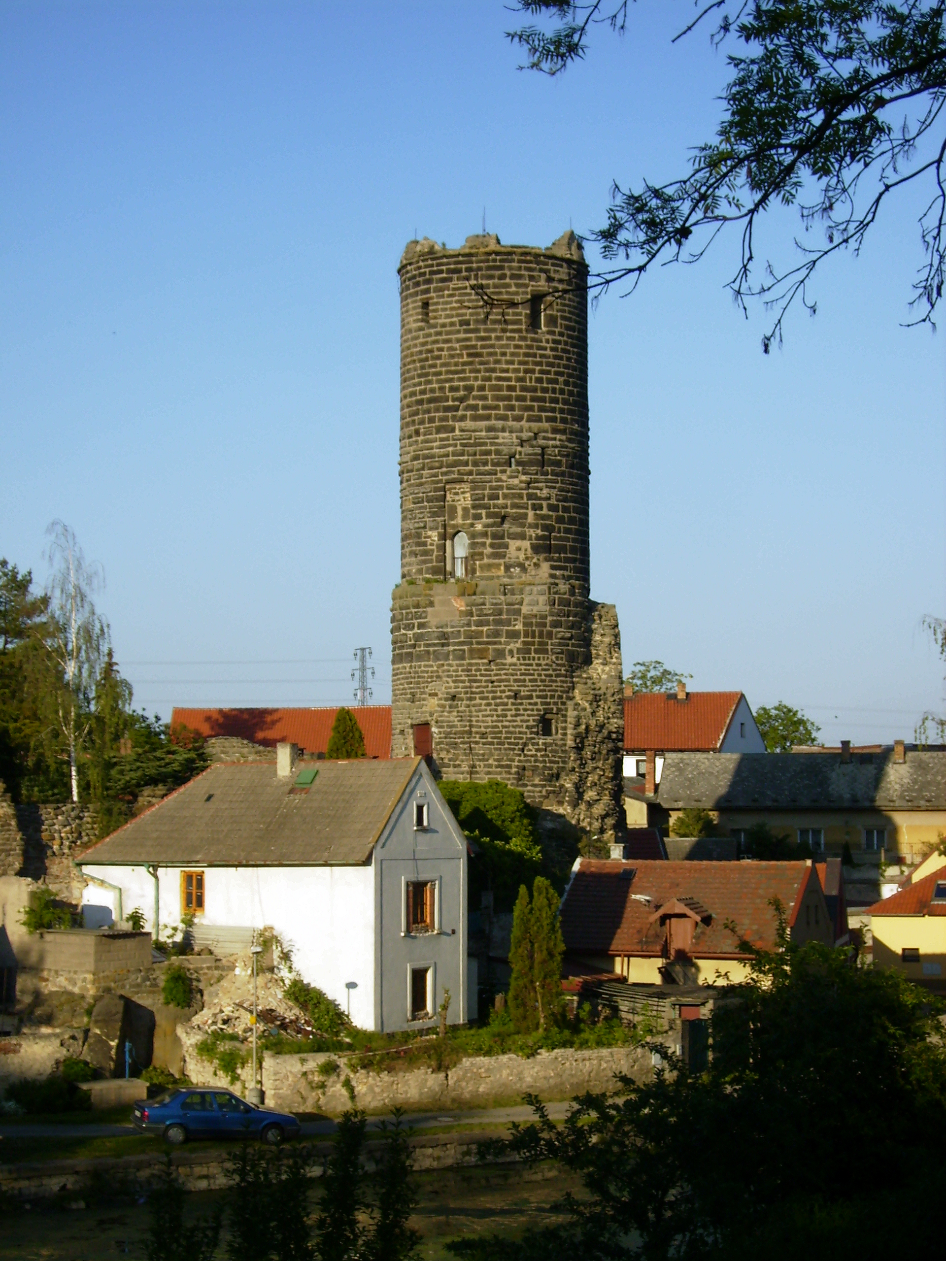 Hrad v Jenštejnu.